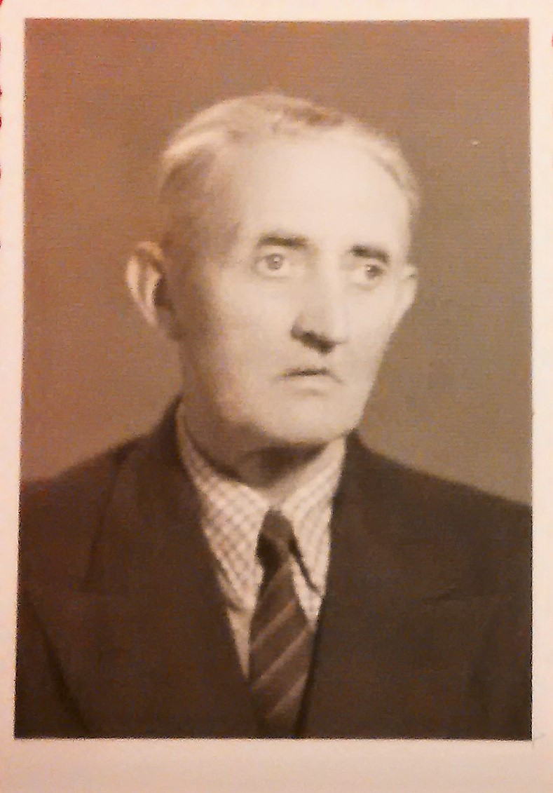 Zdjęcie Stefana Jarmickiego, uczestnika Powstania wielkopolskiego w latach 1918-1919